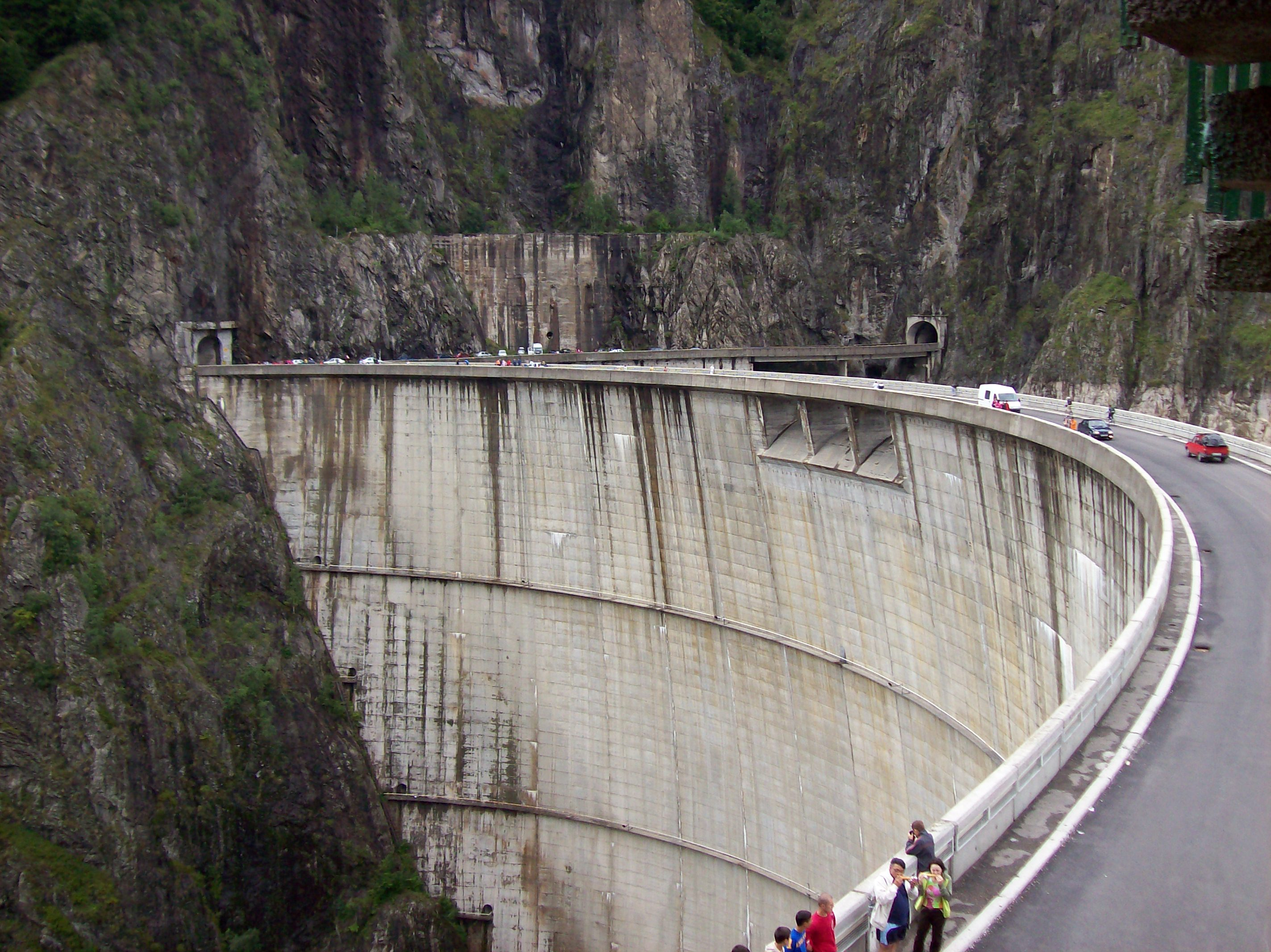 Lacul Vidraru, de dam bij het Vidrarumeer.